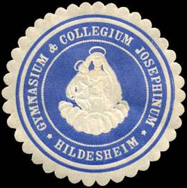 Sealing stamp Title: Gymnasium & Collegium Josephinum - Hildesheim Description: weiß, blau, geprägt Place: Hildesheim size: 4 cm